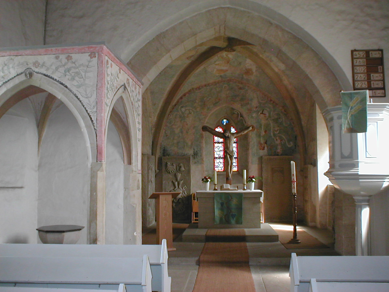 Gotisches Kreuzgewölbe in der aus dem 10. Jhd. stammenden Bergkirche in Heinsheim. Auffallend das mit separatem Kreuzgewölbe überdachte Taufbecken links.